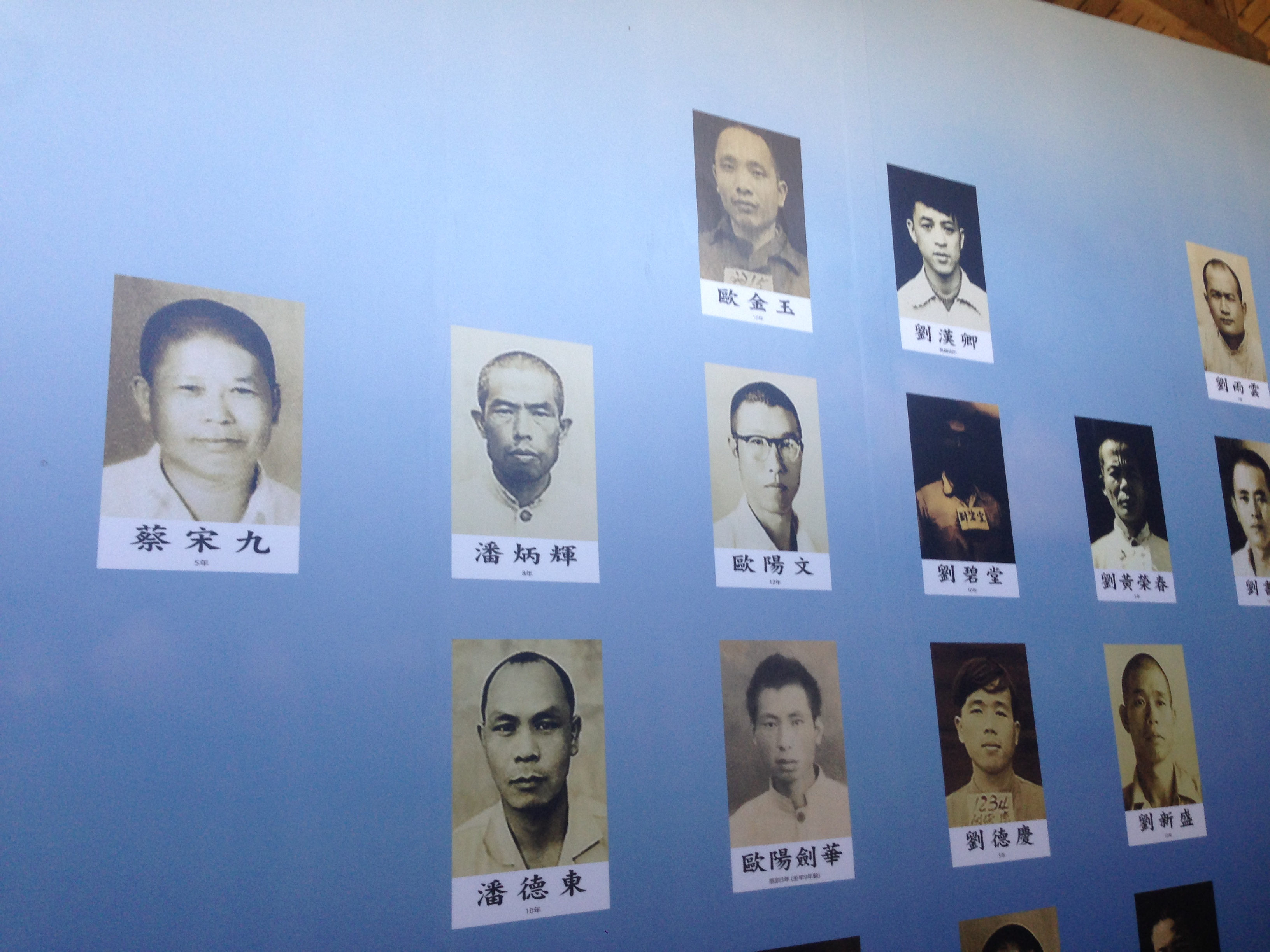 綠島人權文化園區新生訓導處第三大隊展示區的部分囚犯照片